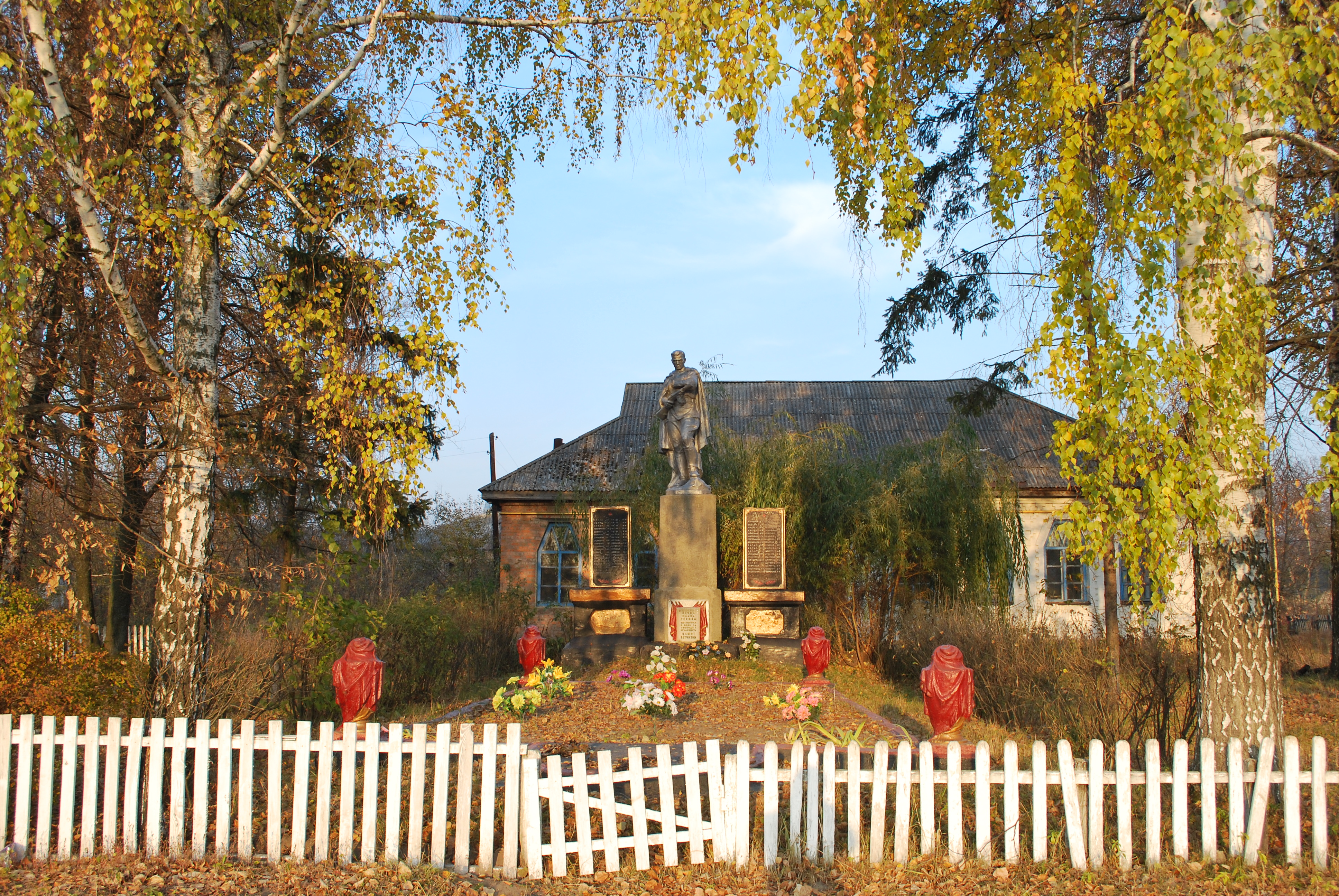 На задньому плані школа Сластіона